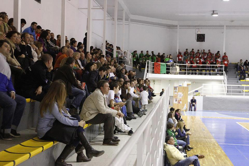 Pabellón Veleta, con Komando Veleta (dcha.) y Frente Nazarí (izda.)